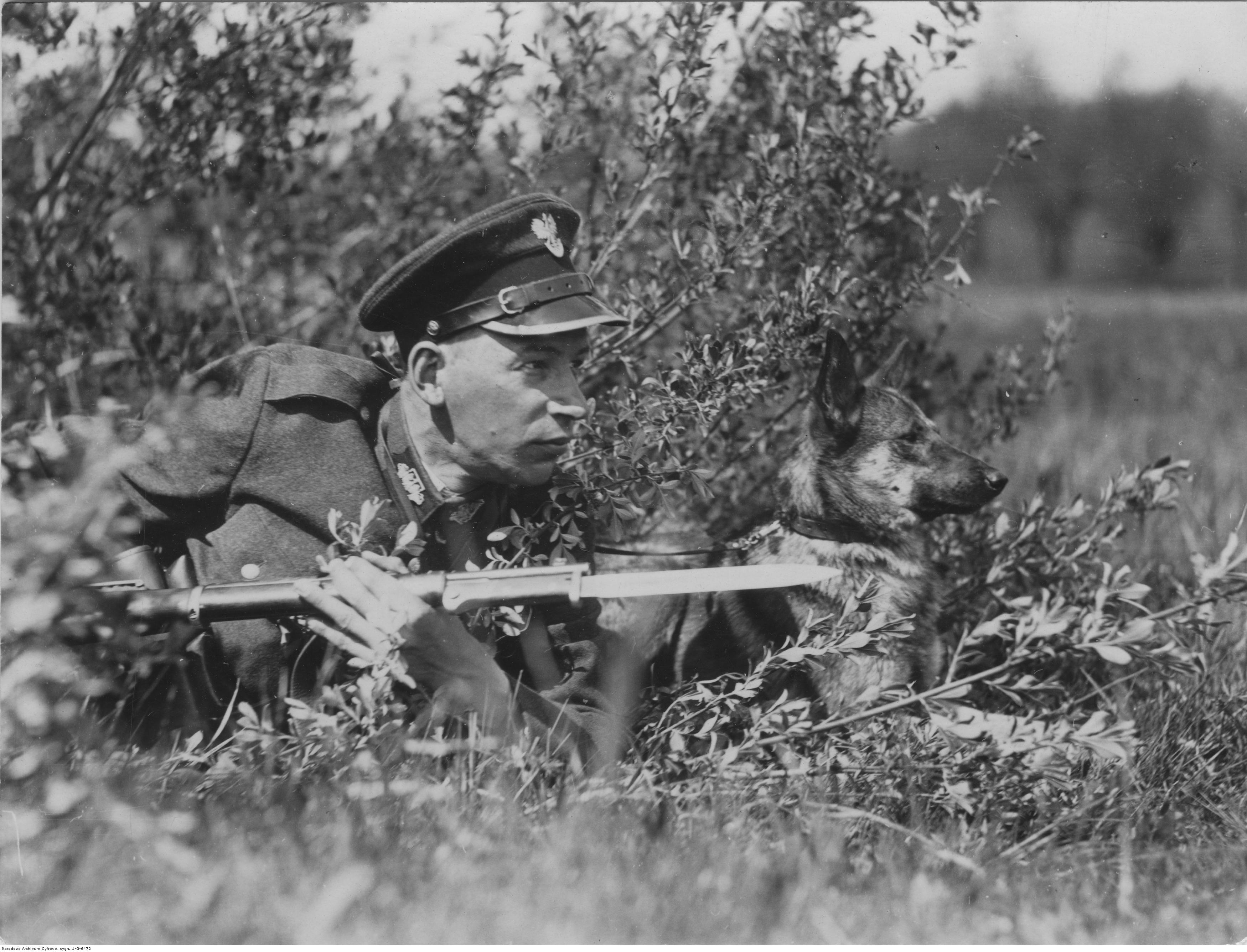 Żołnierz Straży Granicznej na patrolu z psem. Koncern Ilustrowany Kurier Codzienny - Archiwum Ilustracji. Sygnatura: 1-G-6472